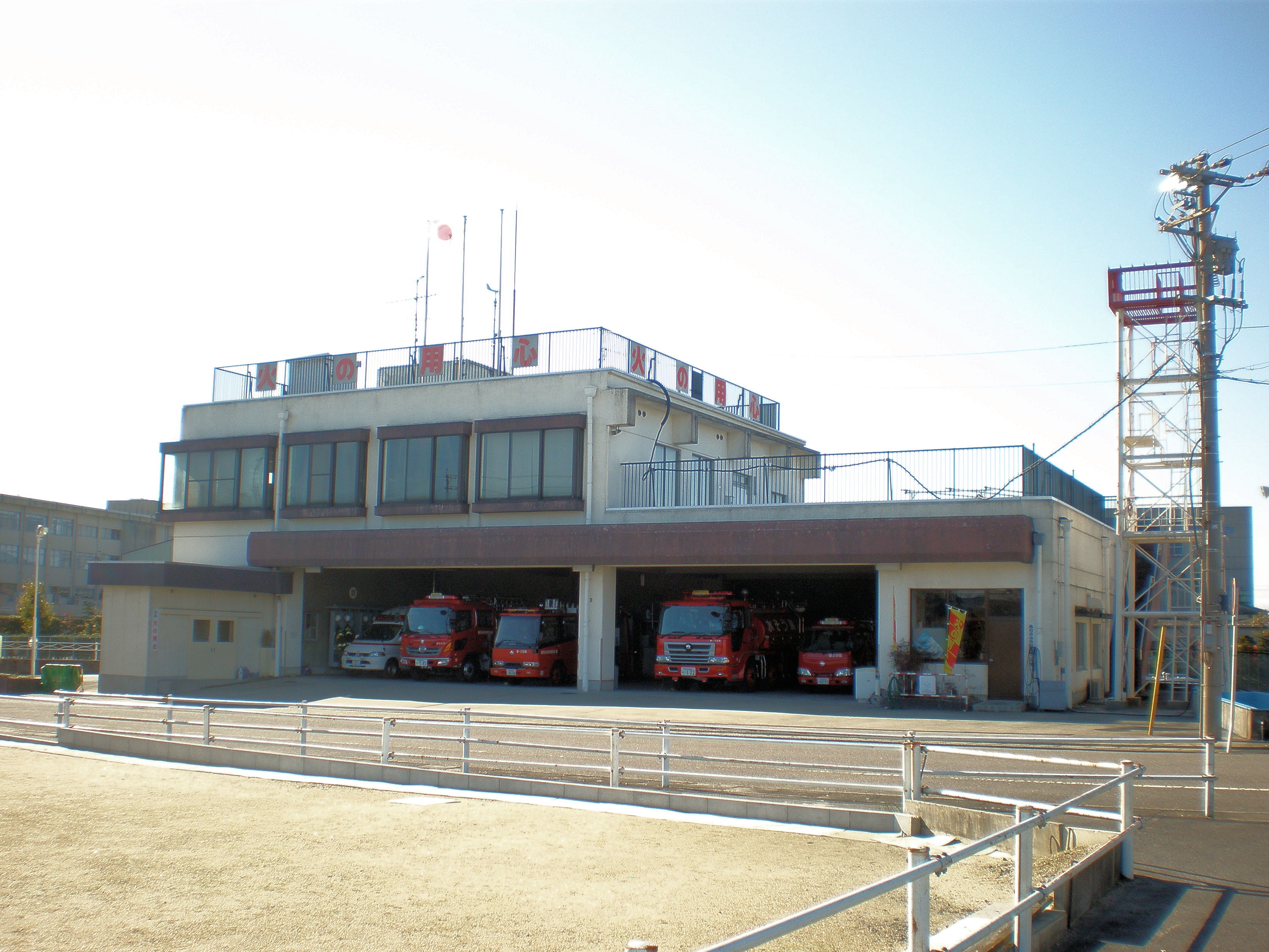 愛知県春日井市にある春日井市消防本部北出張所